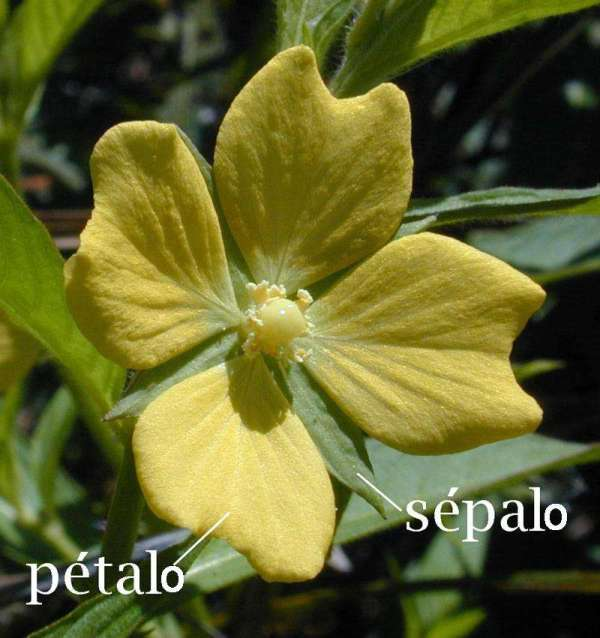 Detalle de pétalo y sépalo. Flor de prímula, fotografiada en Hawaii por Eric Guinther